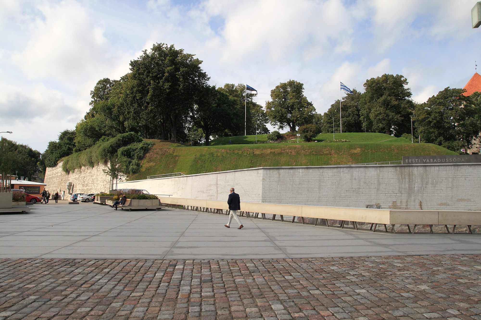 All-linna kindlustused